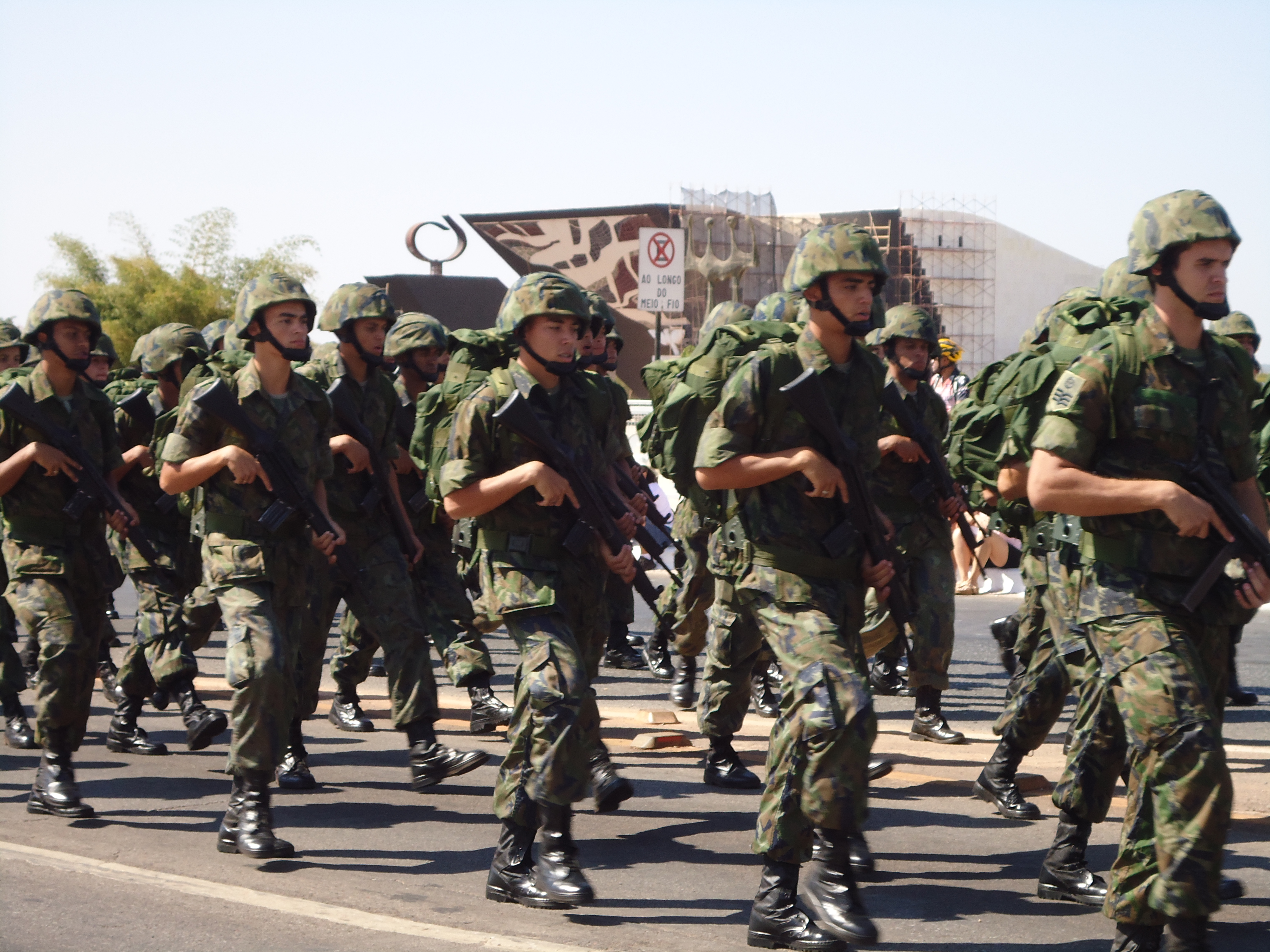 Infantaria da FAB